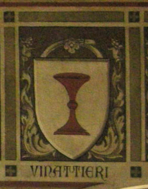 Stemma dell'arte dei vinattieri, palazzo dell'arte della lana